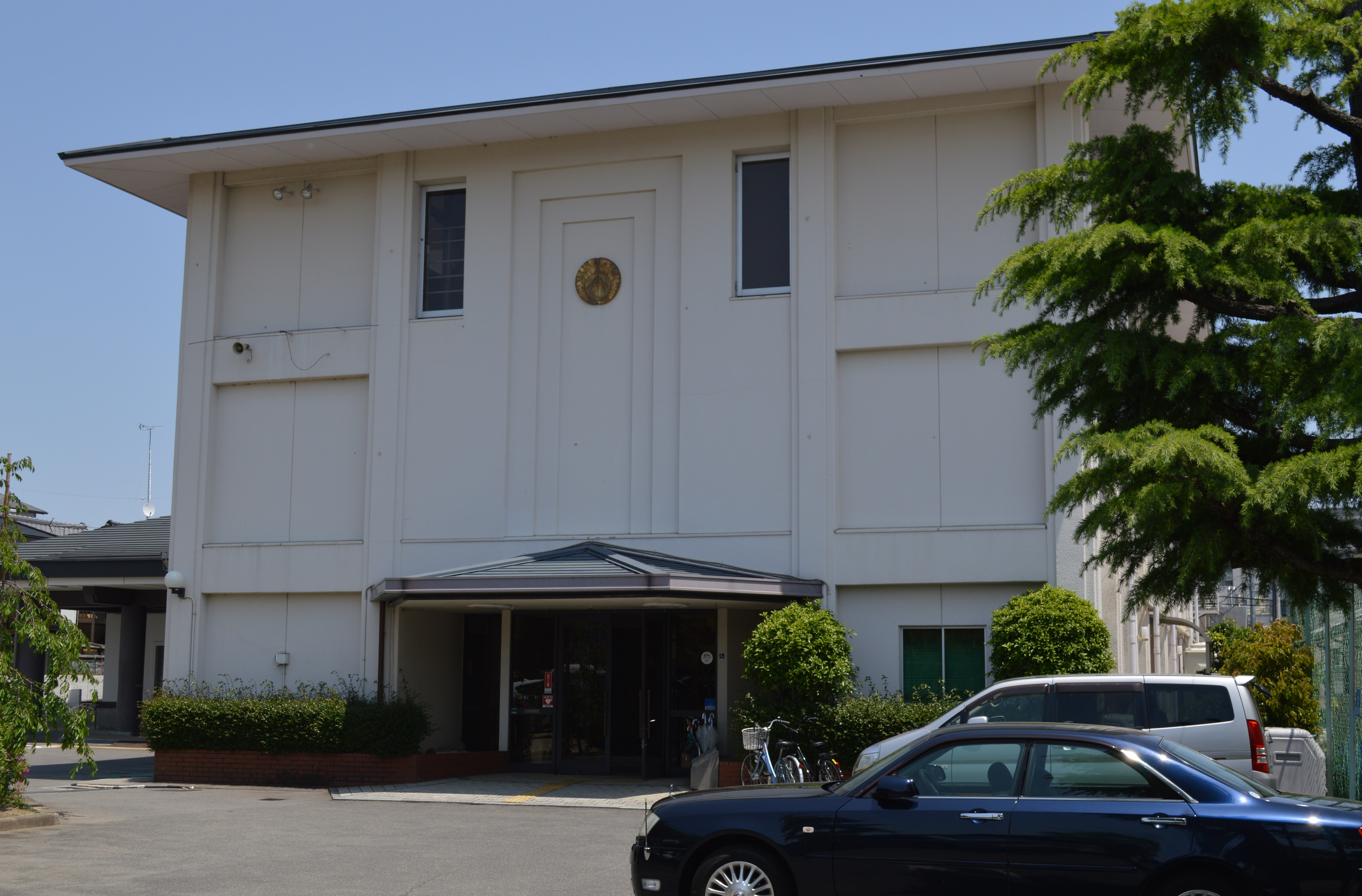 中央仏教学院